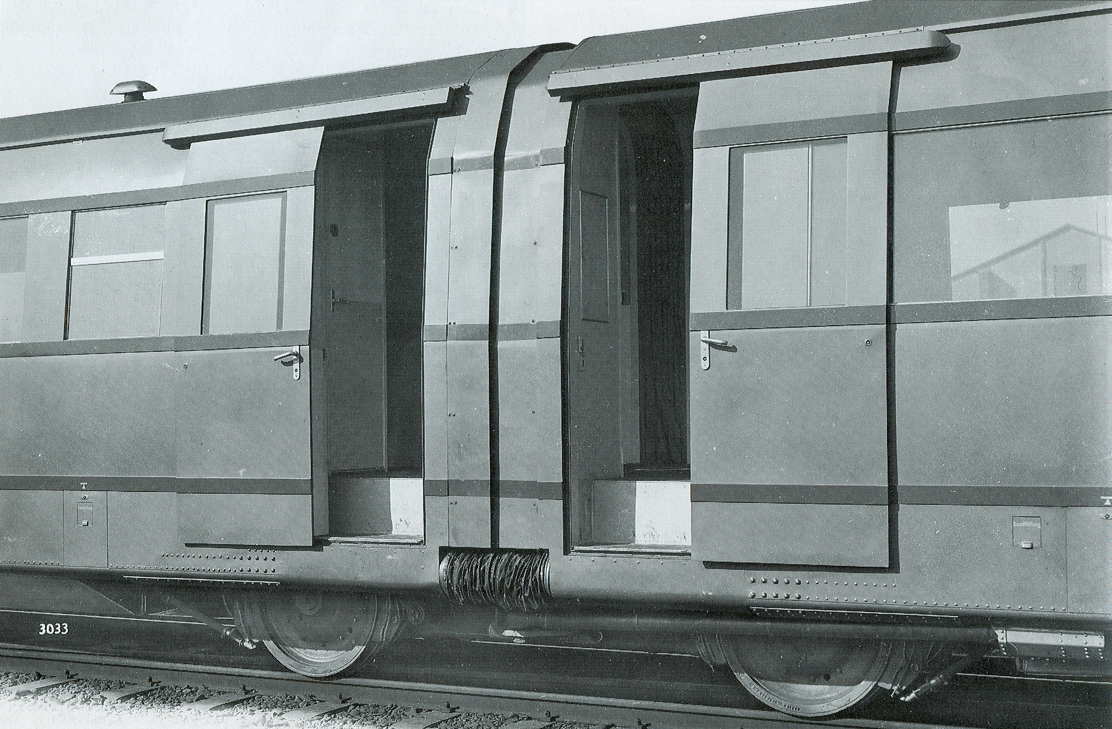 Einstiegstüren des SVT Kruckenberg auf einer Werksaufnahme von Westwaggon